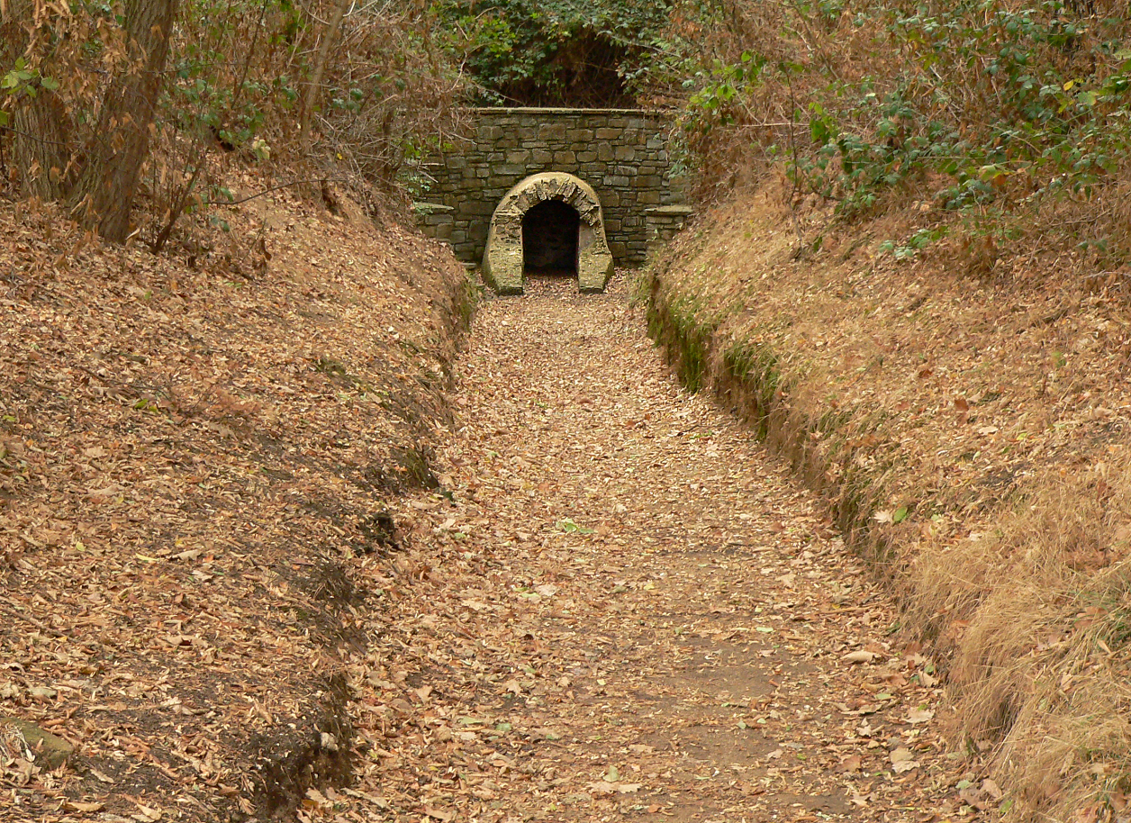 Römerkanal-Wanderweg Aufschluss Buschhoven mit angedeutetem Verlauf der Wasserleitung